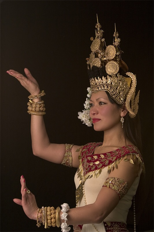 Möglichkeiten zur Lizenzierung, bitte die nicht-benötigte Variante aus dem Code löschen: (Original text: Kambodschanische Tempeltaenzerin im Apsara-Kostüm - Cambodian Apsara Dancer.)